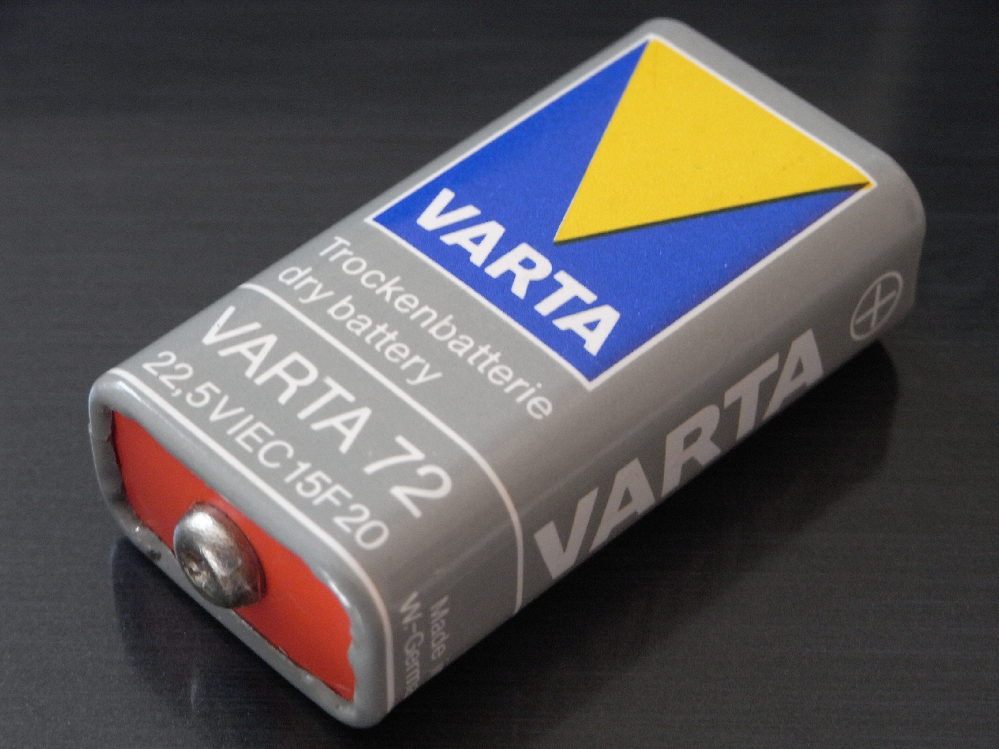 VARTA-Trockenbatterie "VARTA 72 22,5 V IEC 15F20"